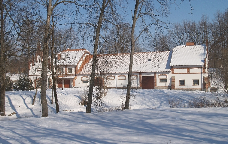 Vėžaičių dvaro arklidėse įsikūrę kultūros namai